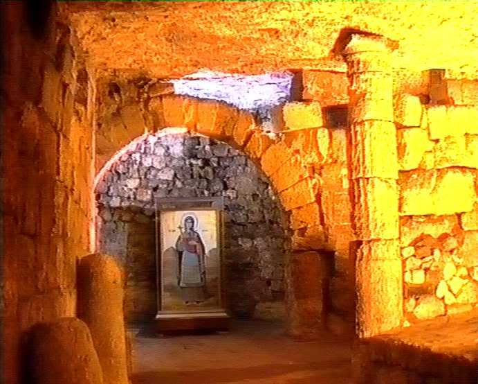 Ayathekla, Pilgerstätte der Hl. Thekla in Silifke, Südtürkei, zur Kirche umgebaute Wohnhöhle der Heiligen